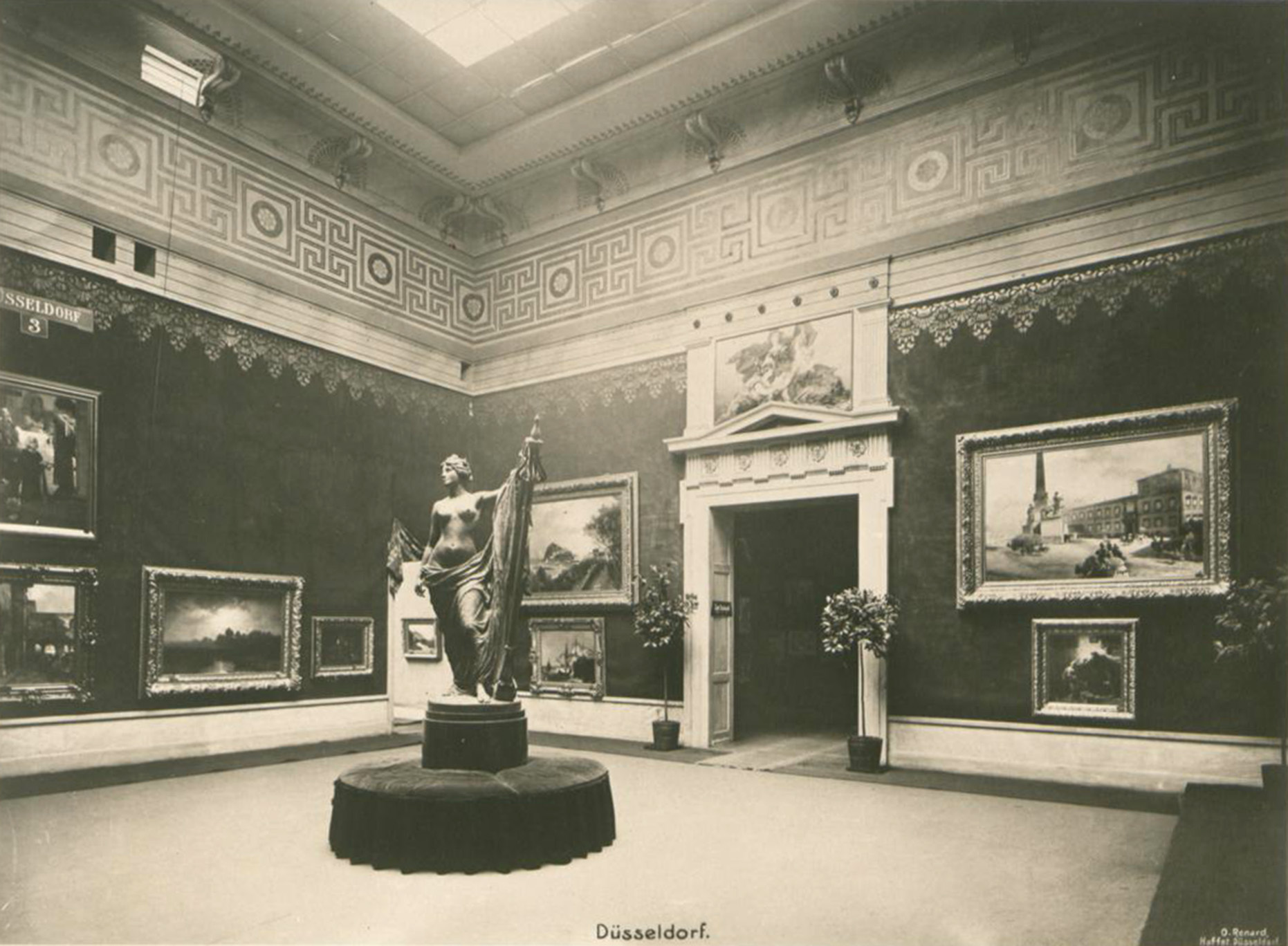 Kunstpalast, Raum 3 Düsseldorf, Foto Otto Renard, 1902